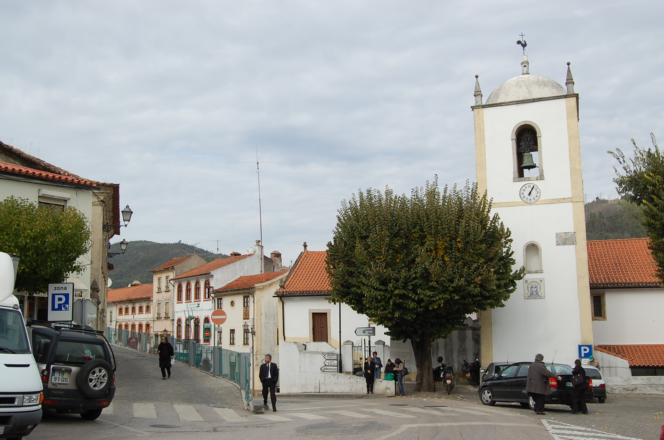 Centro de Penacova.